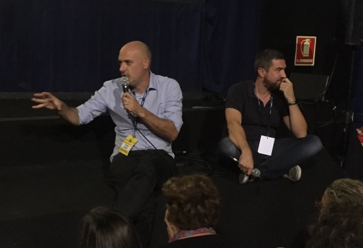 Stefano Liberti ed Enrico Parenti durante la presentazione del documentario Soyalism al festival della rivista Internazionale a Ferrara.